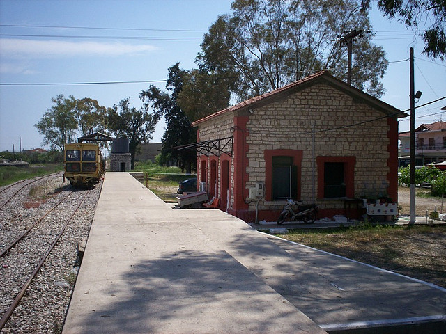 Aitoliko railway station